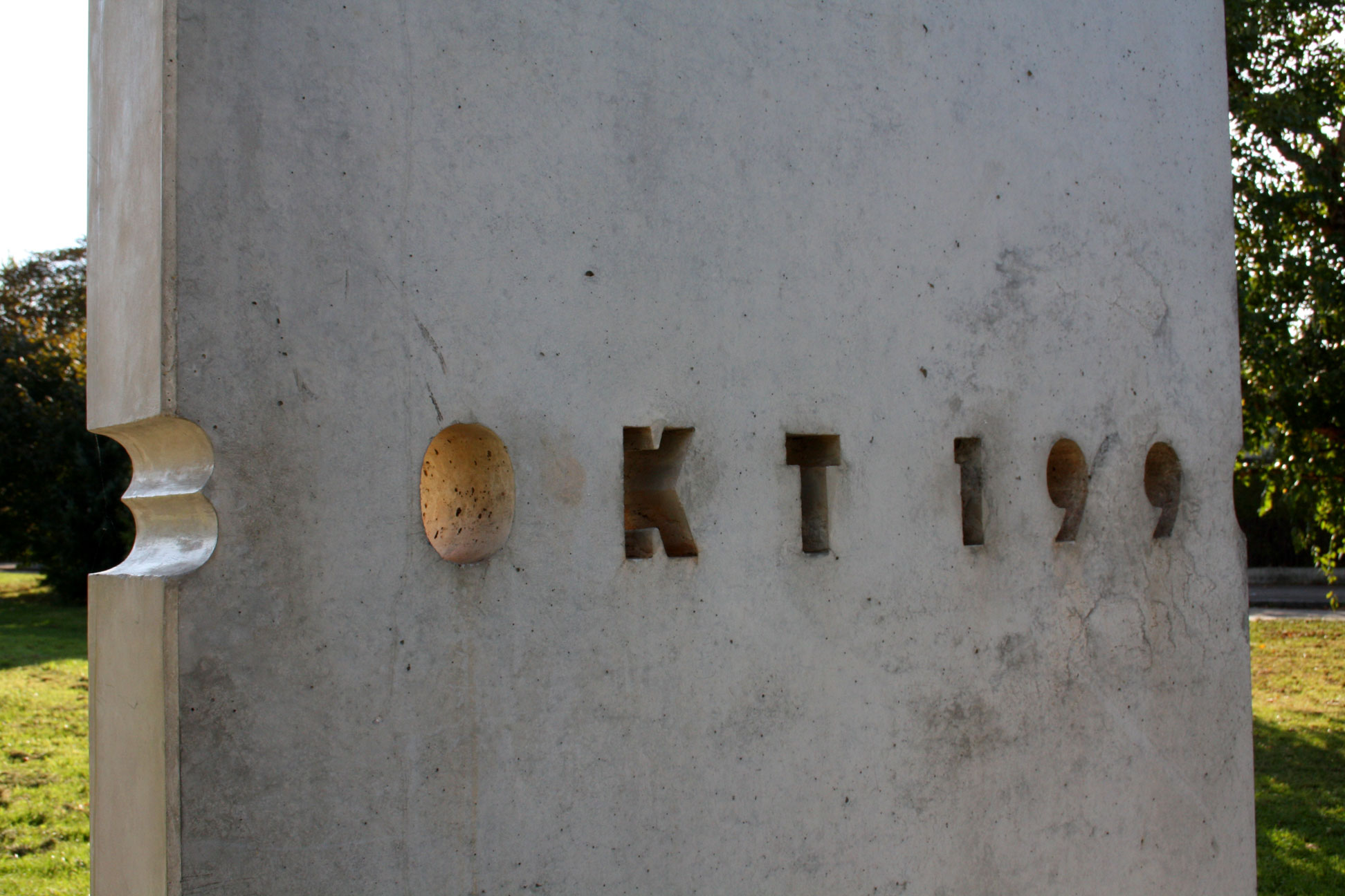 Denkmal Zur Deutschen Einheit, Denning, München: Teilansicht der Stele mit Schriftzug